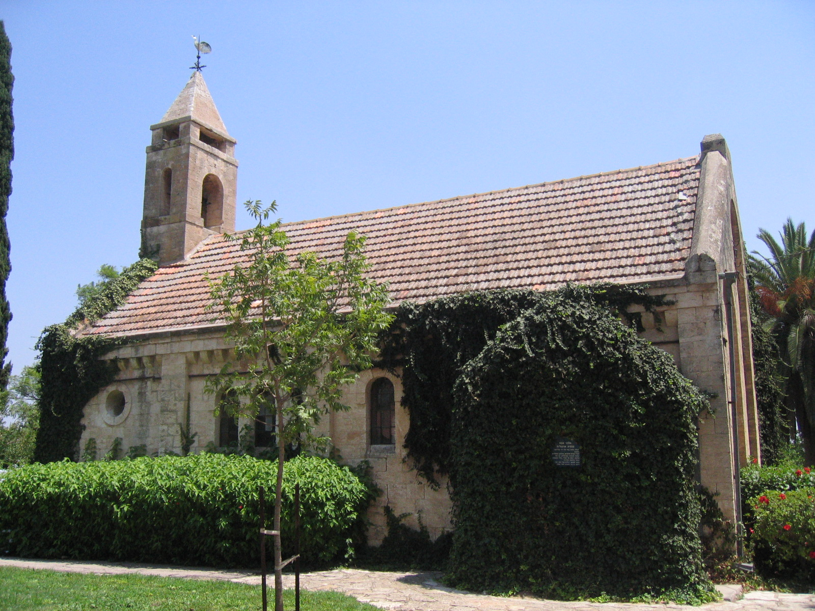 הכנסייה האוונגלית באלוני אבא